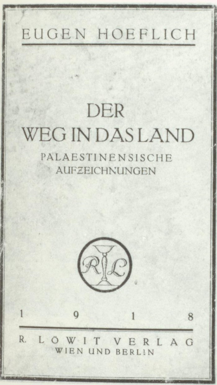 Eugen Hoeflich Der Weg in das Land 1918 Einband